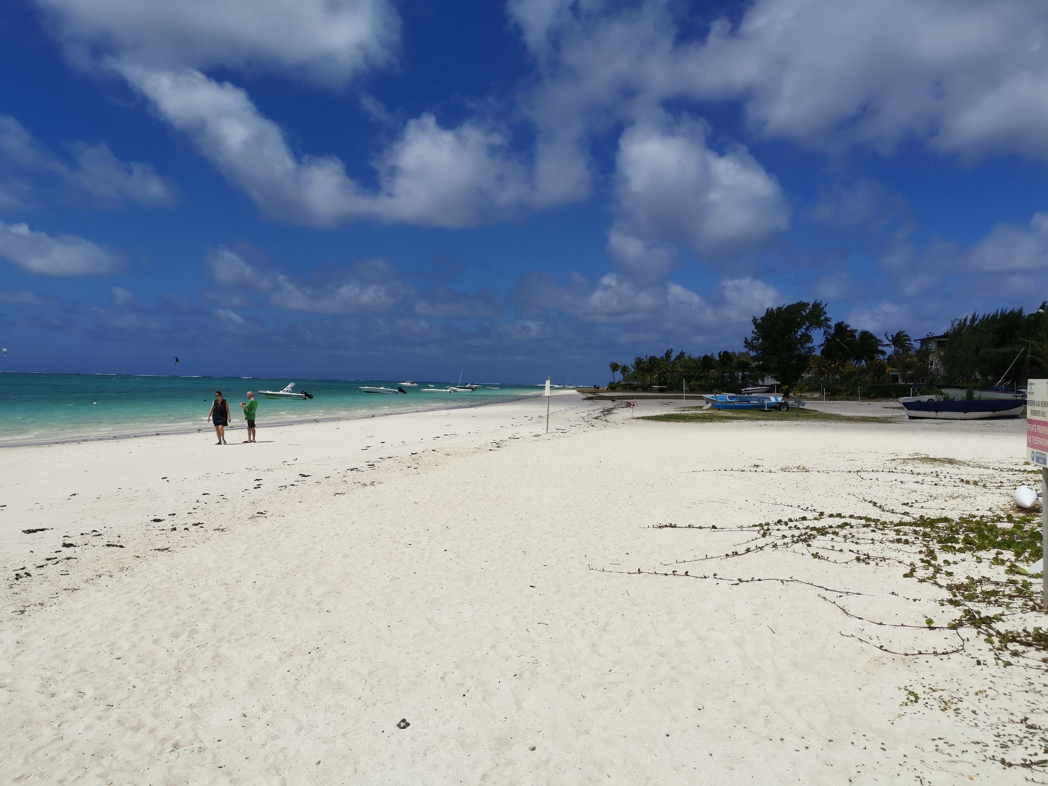 Pointe d'Esny an der Ostküste von Mauritius